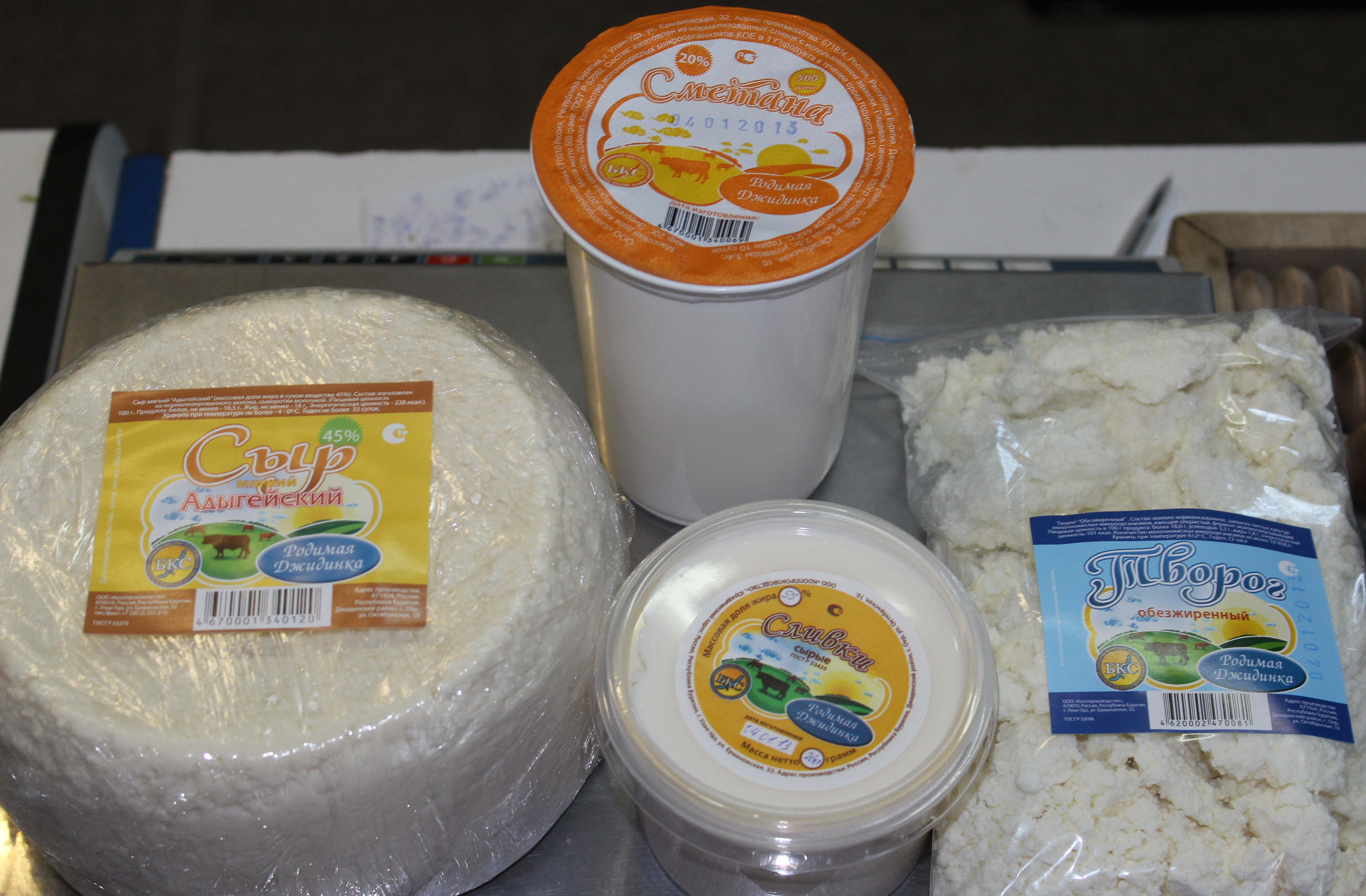 Молочная продукция СПК "Оёрское". Джидинский район, Бурятия